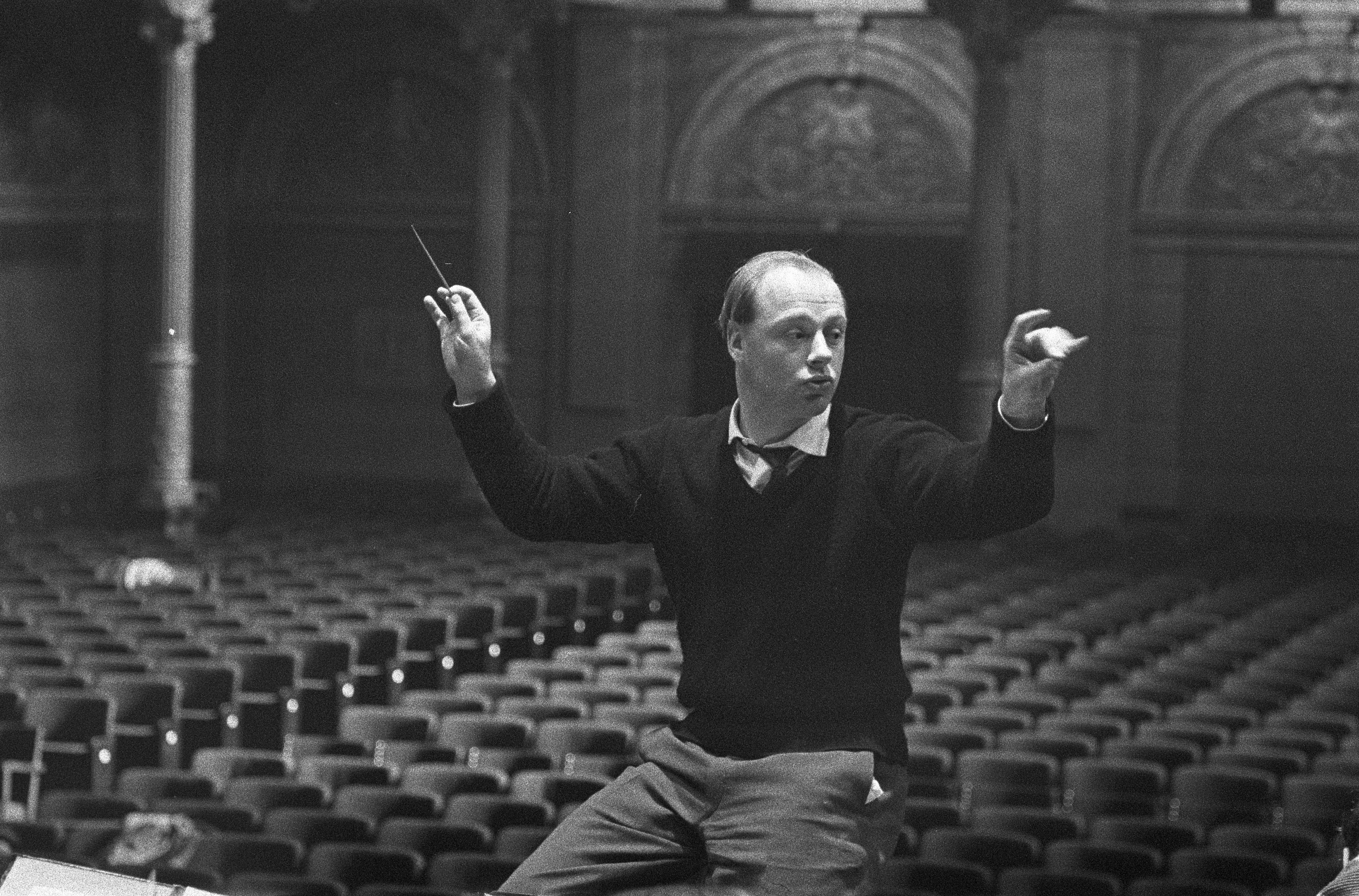 Collectie / Archief : Fotocollectie Anefo Reportage / Serie : [ onbekend ] Beschrijving : Bernard Haitink opvolger van Eduard van Bernum repeteert voor de eerste maal met het Concertgebouworkest, Bernard Haitink tijdens Datum : 24 maart 1960 Trefwoorden : Concertgebouworkesten, opvolgers, repetities Persoonsnaam : Bernard Haitink, Eduard van Bernum Fotograaf : Pot, Harry / Anefo Auteursrechthebbende : Nationaal Archief Materiaalsoort : Negatief (zwart/wit) Nummer archiefinventaris : bekijk toegang 2.24.01.05 Bestanddeelnummer : 911-1195